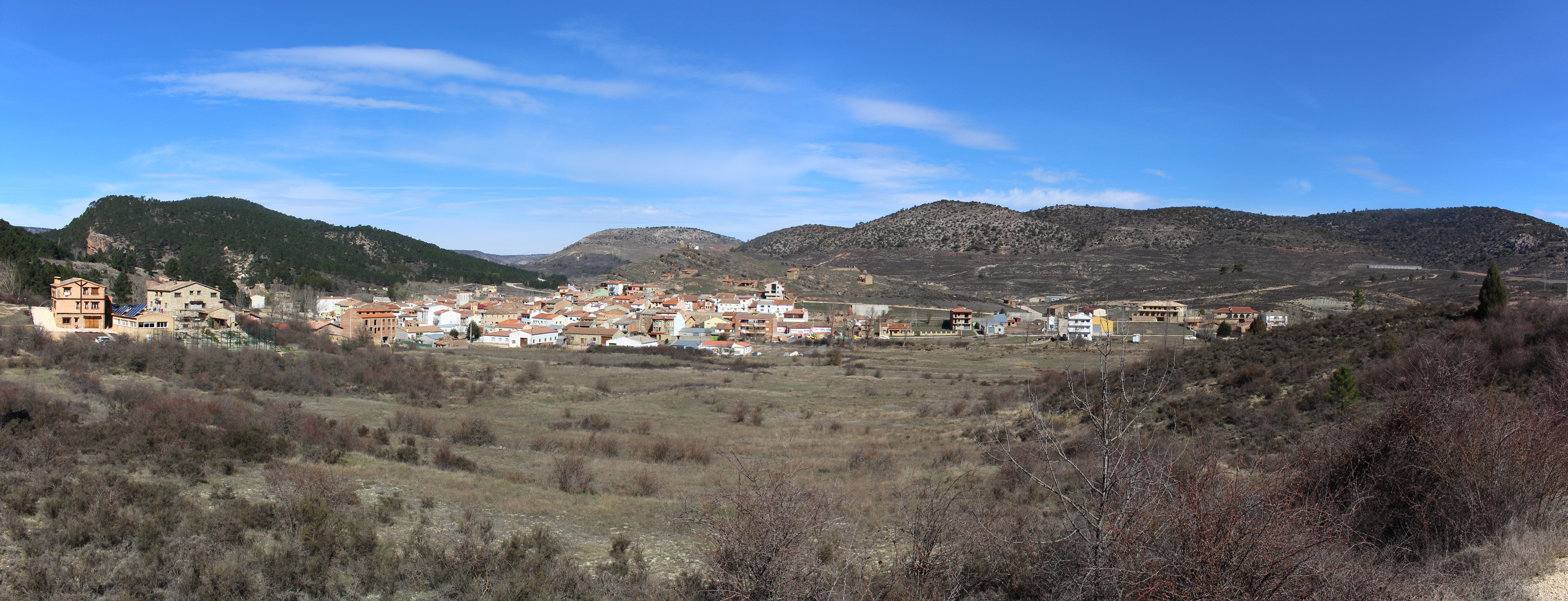 Panorámica de Boniches